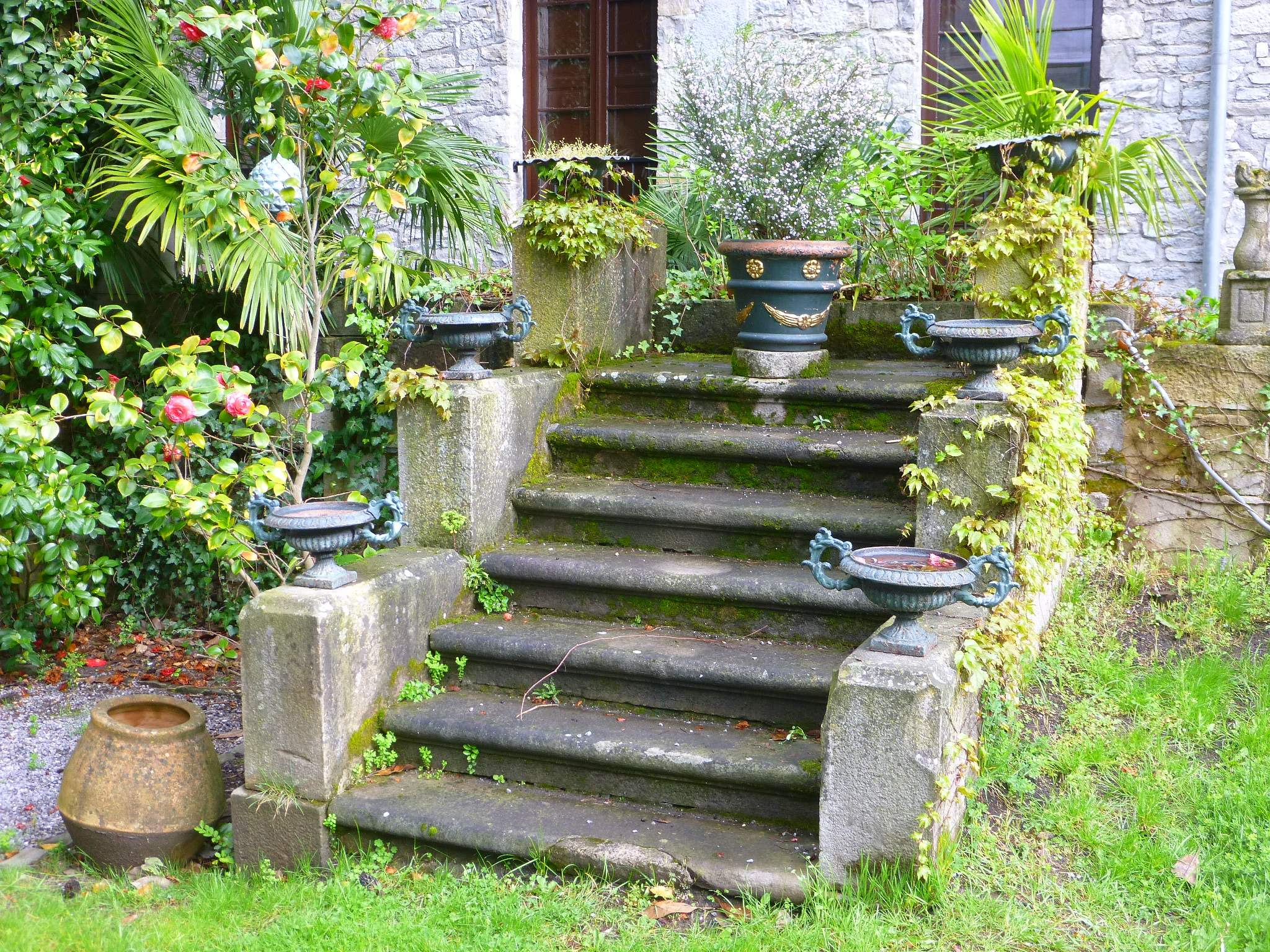 Bergara - Torre Olaso